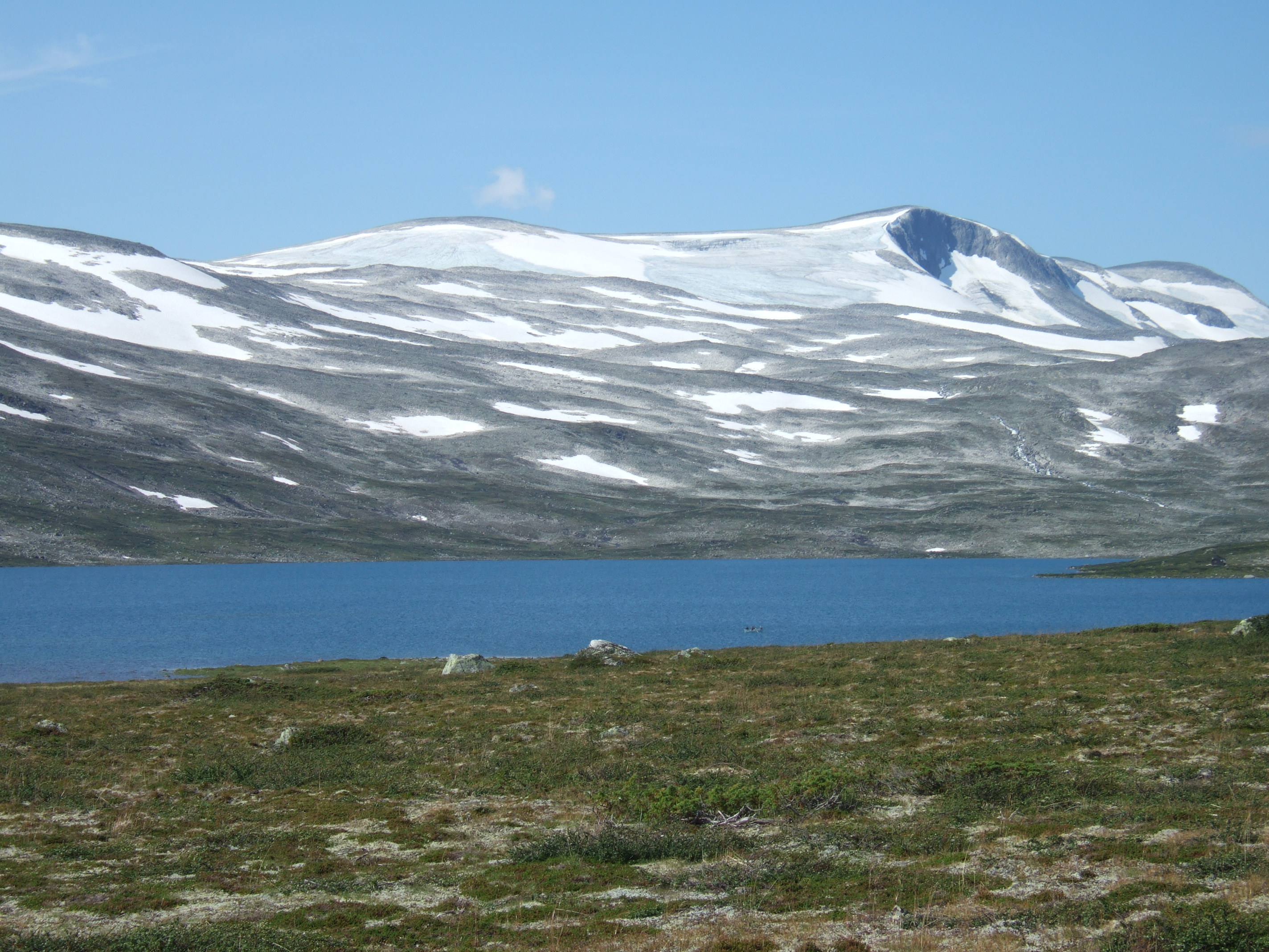 Skridulaupen i Skjåk kommune i Oppland.